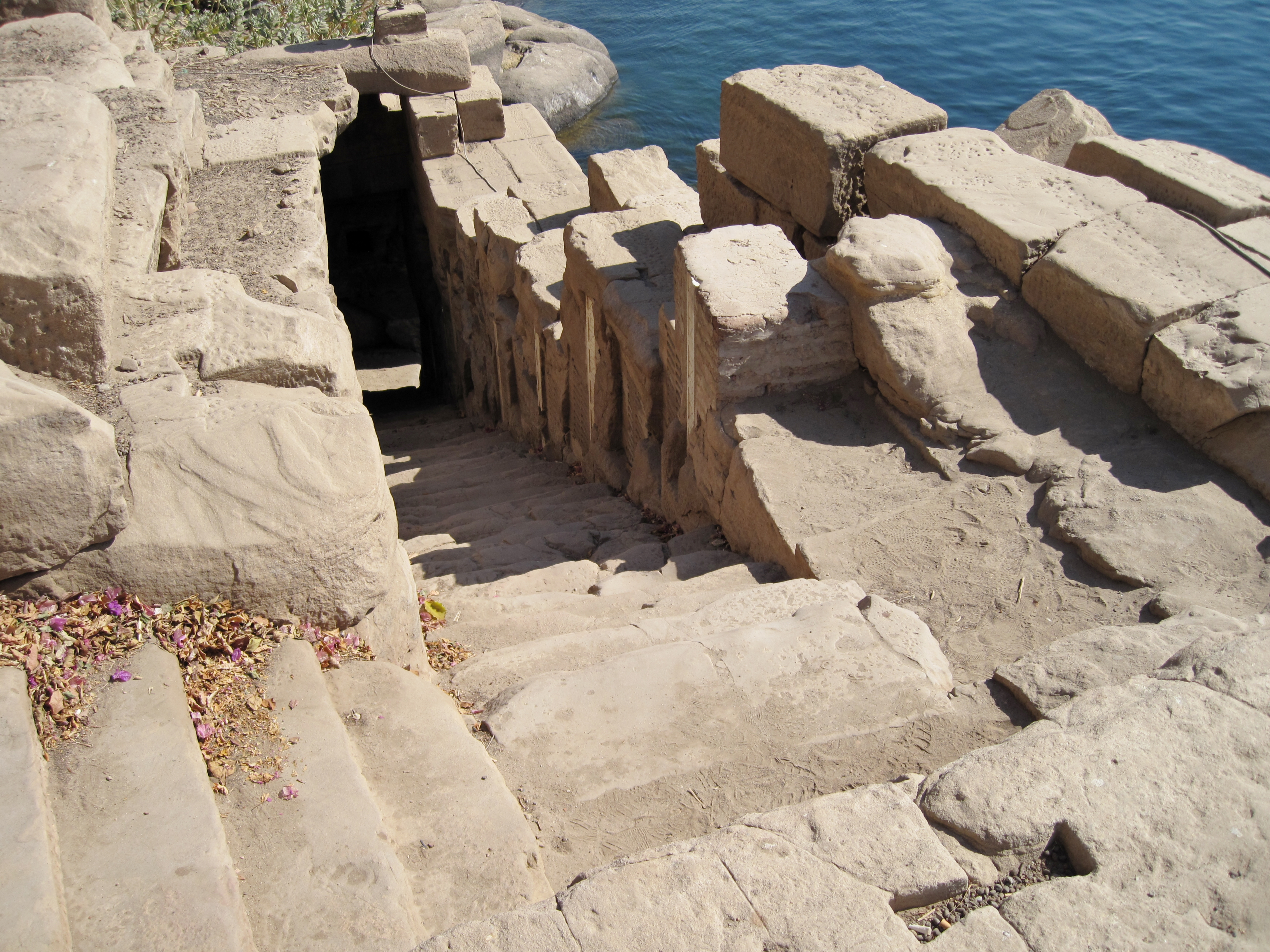 Nilometer an der Südostseite der Insel Elephantine in Assuan, Ägypten